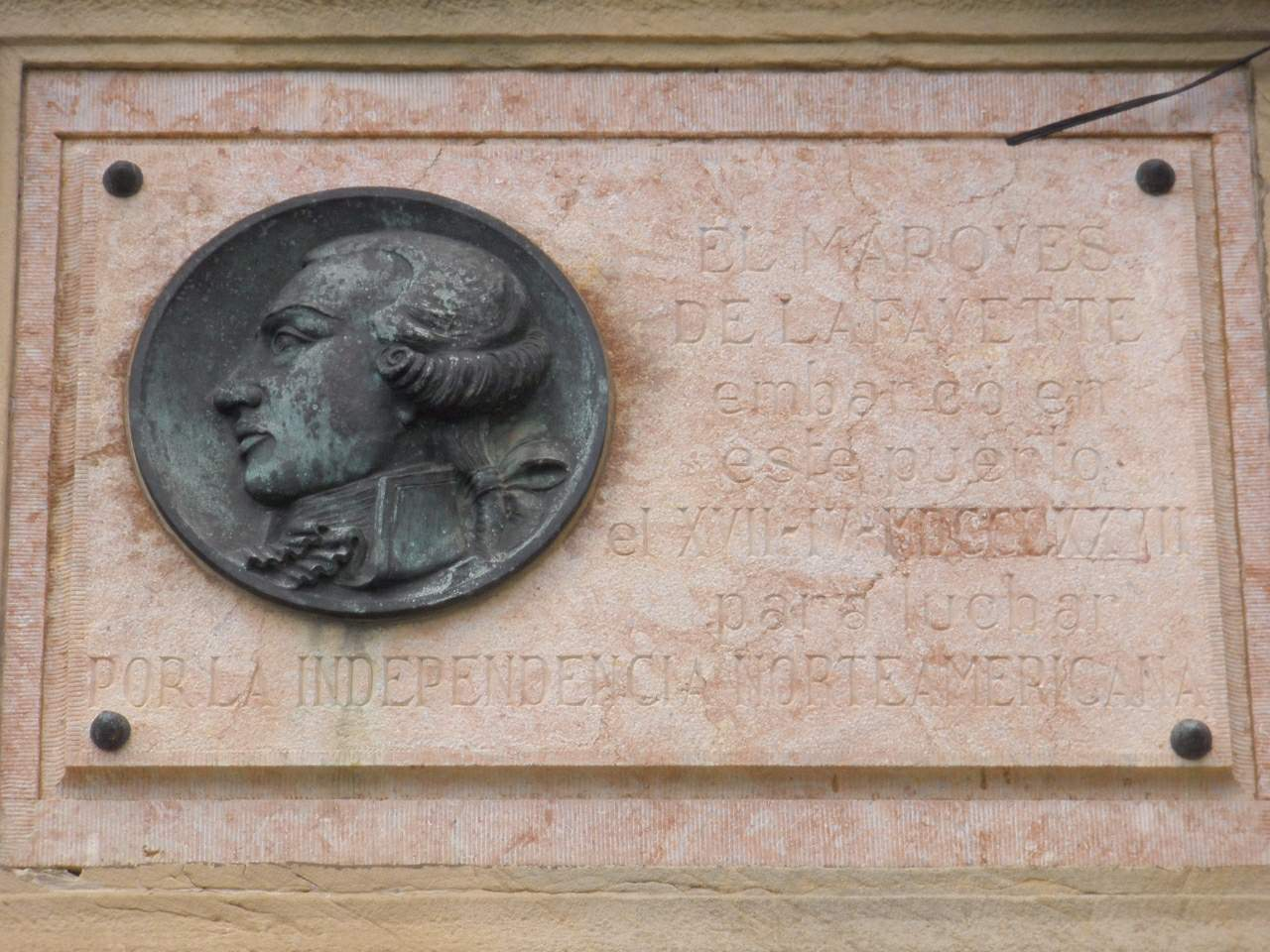 Pasajes de San Juan (Gipuzkoa) - Memorial del Marqués de La Fayette